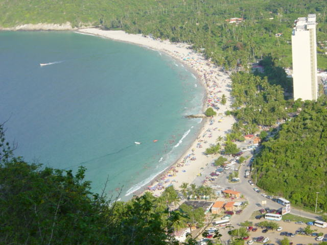 Vista aérea de la Bahía de Cata, Municipio Ocumare de la Costa de Oro, Estado Aragua, Venezuela.